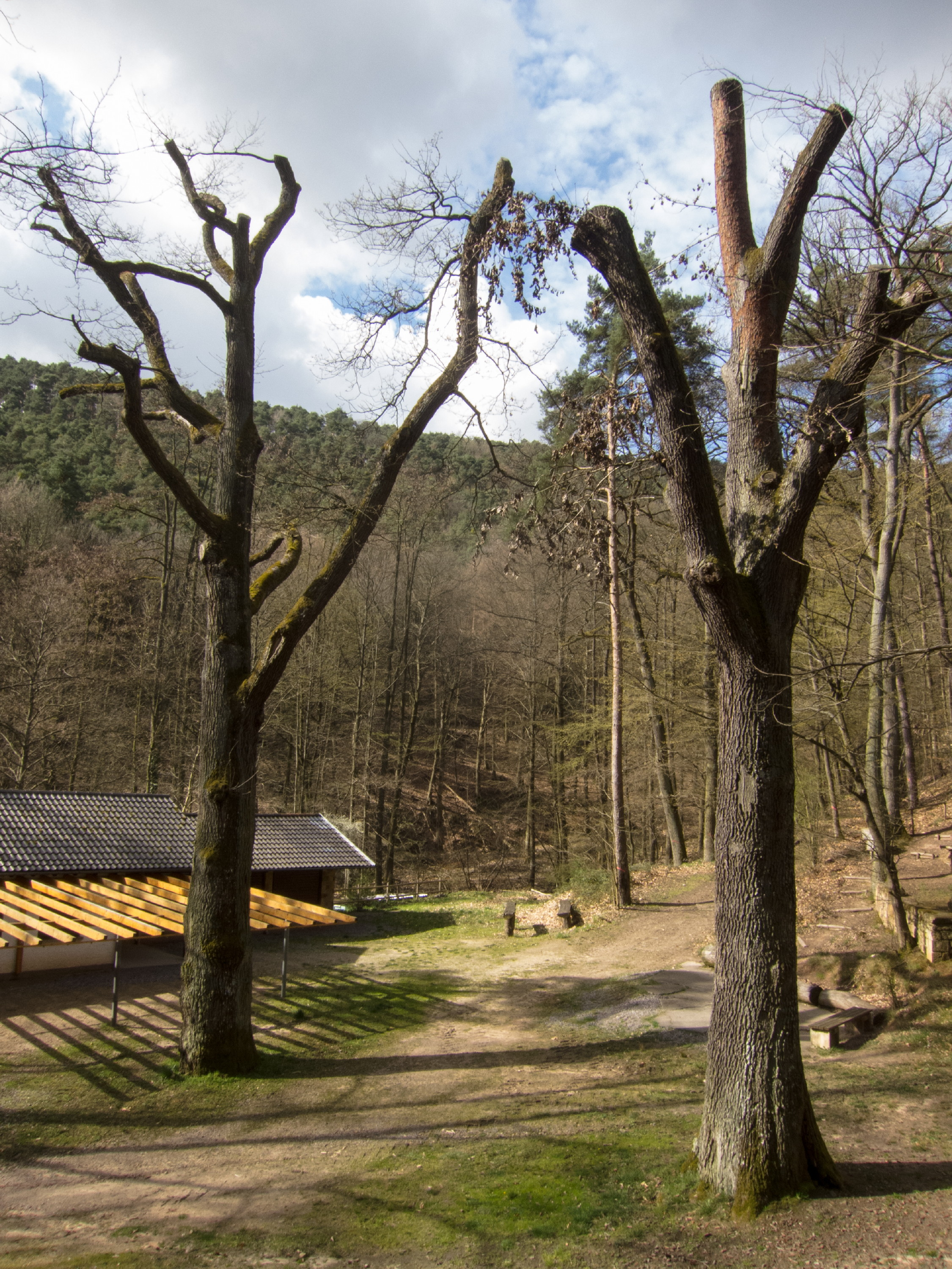 Naturgeschützte Eichen (ND 7332-183) bei Deidesheim